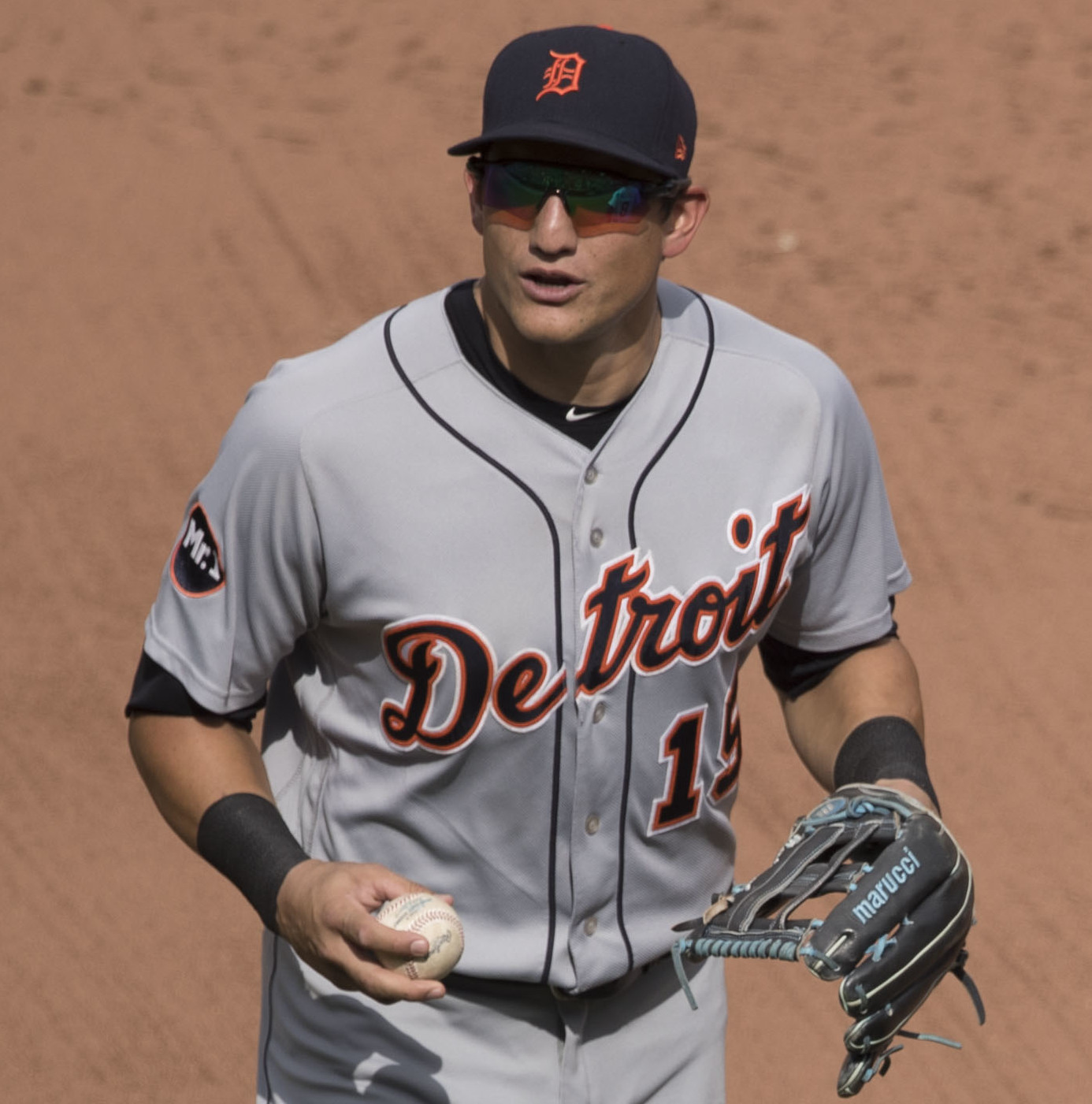 Tigers at Orioles 8/6/17